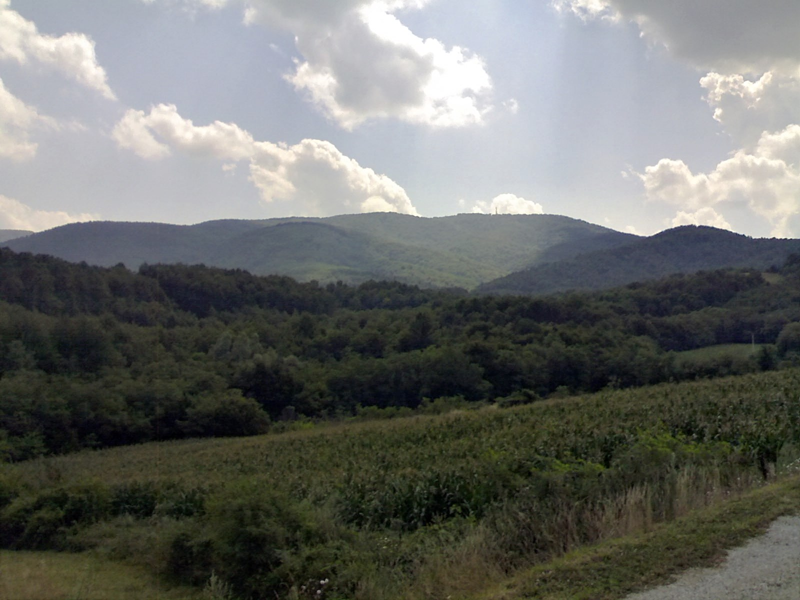 Планина Цер